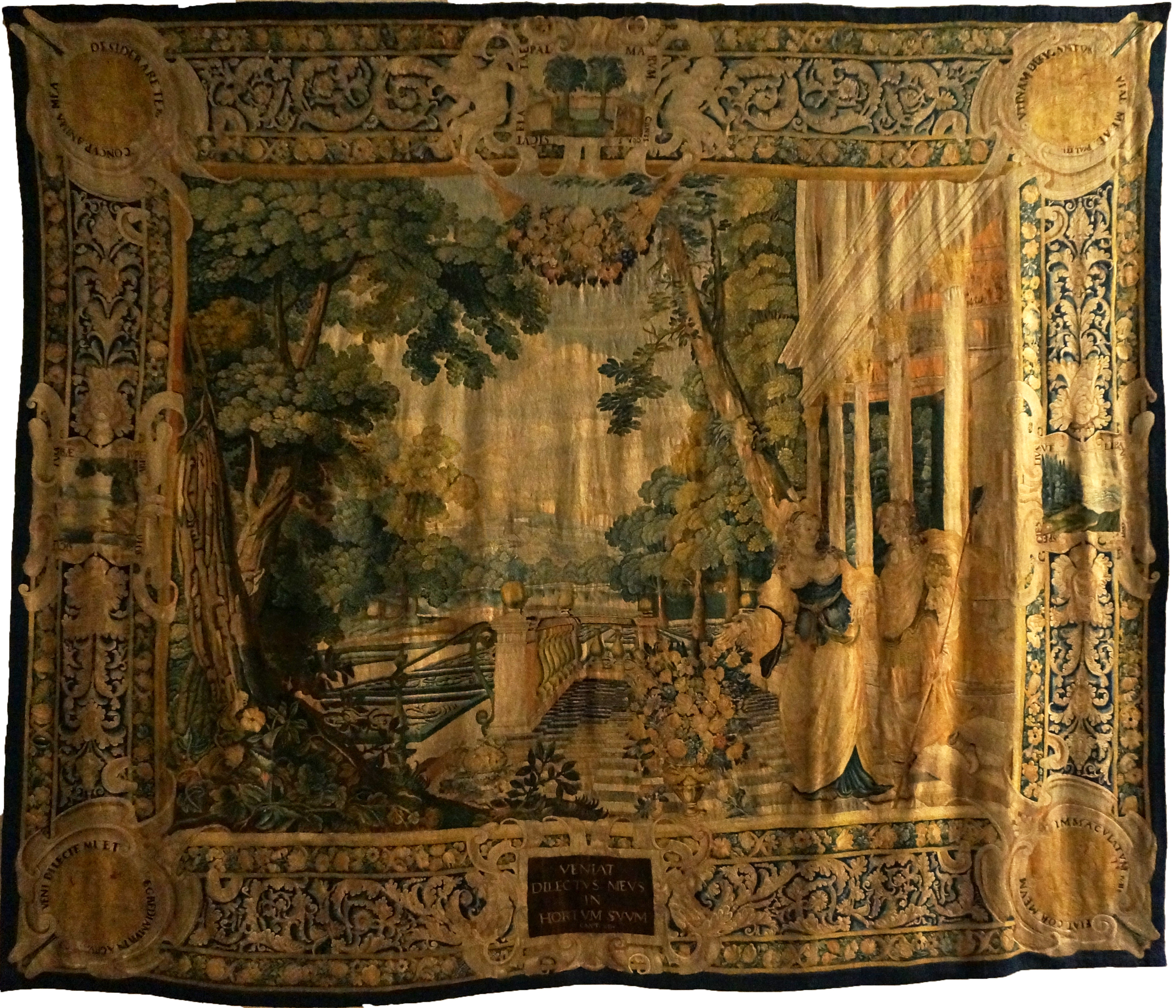 Fabrication française de la fin du XVIIe siècle, provient du château d'Hauteville dans l'Aisne. Sur le thème du Cantique des cantiques.